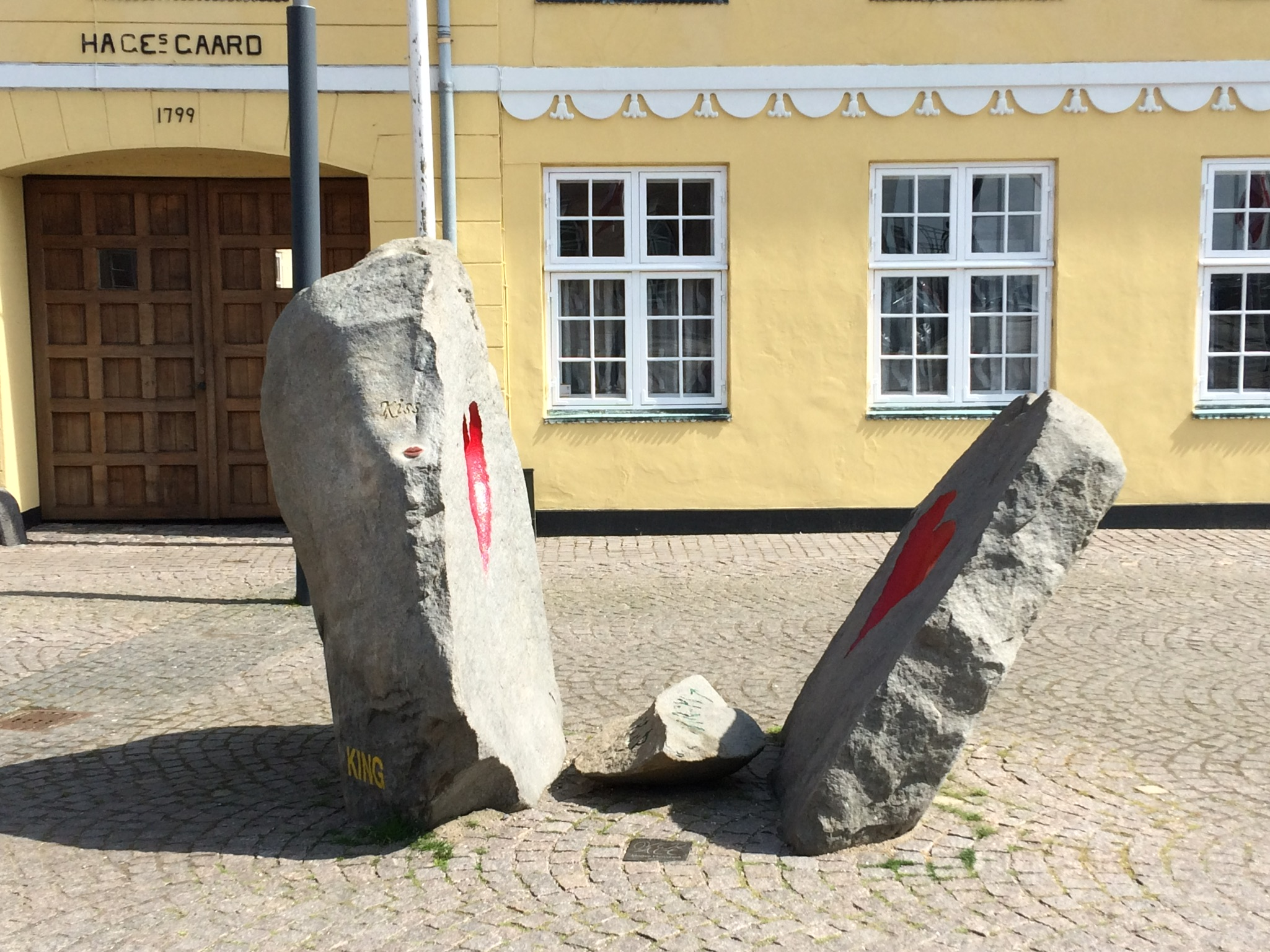 Skulptur på Hages torv i Stege med titel Overalt af Morten Flyverbom fra 2015